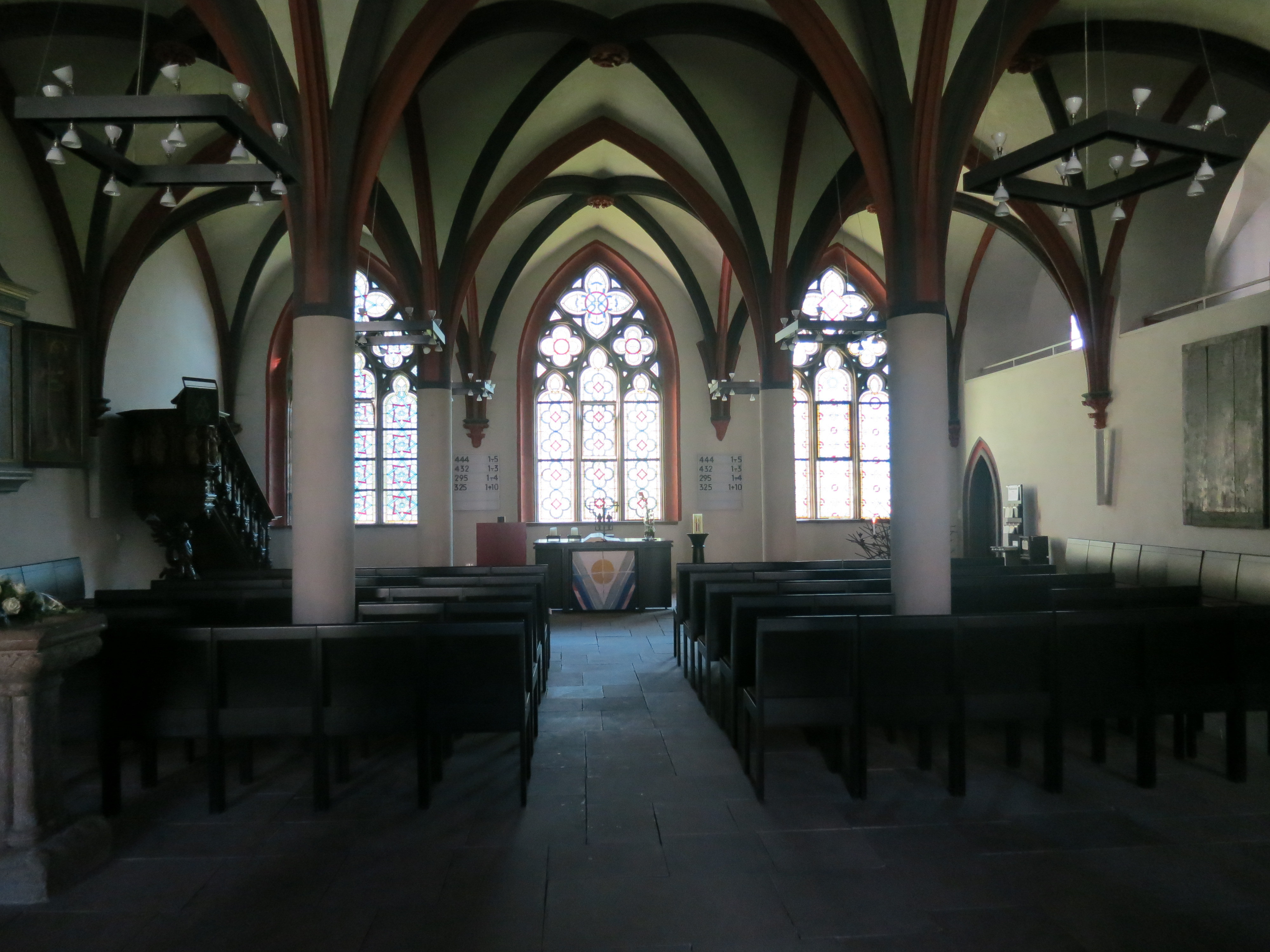 Die evangelischen St.-Maria- und Martini-Kirche im ehemaligen Kapitelsaal des Klosters Walkenried